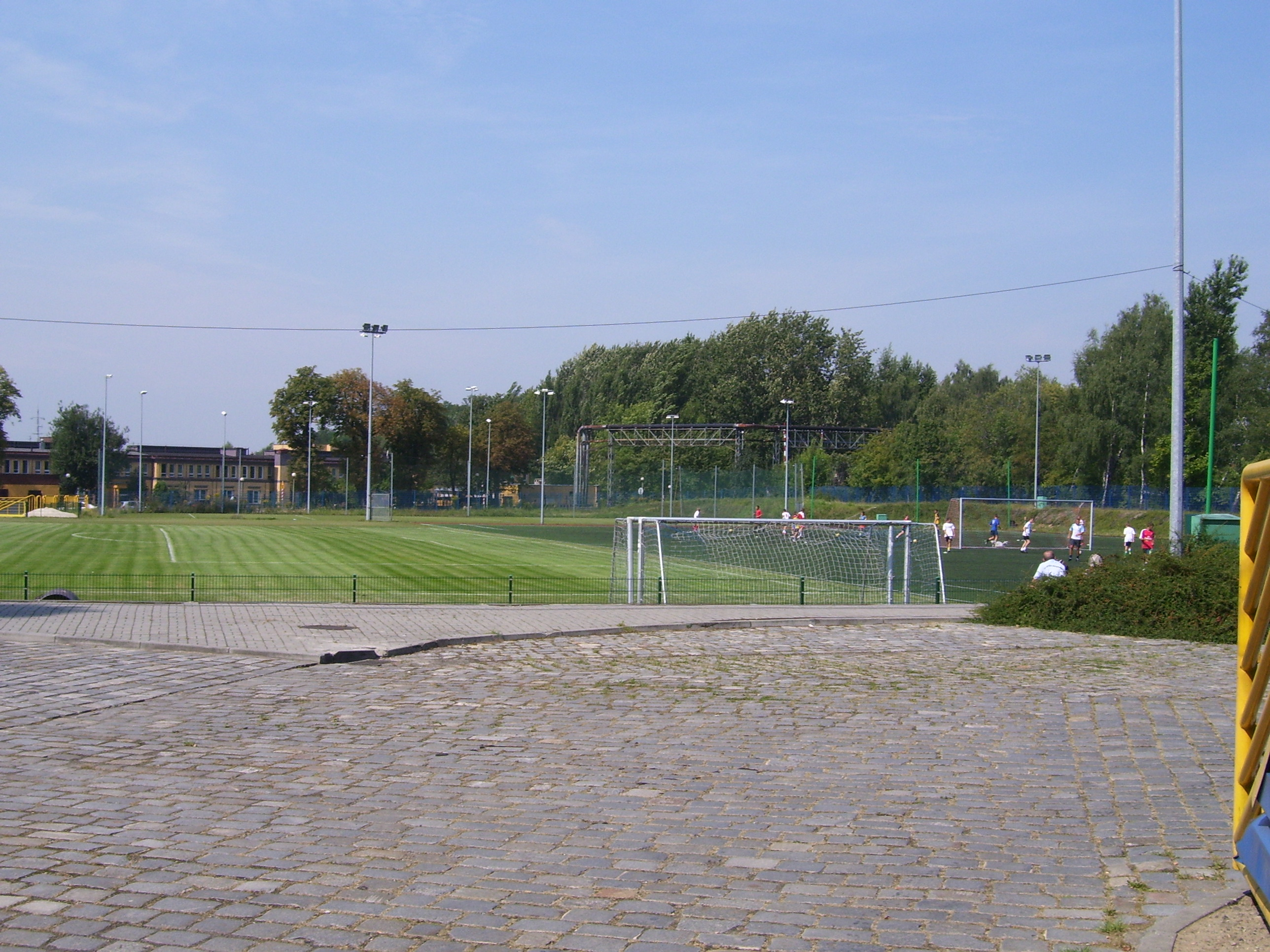 Boisko Gwarka Zabrze